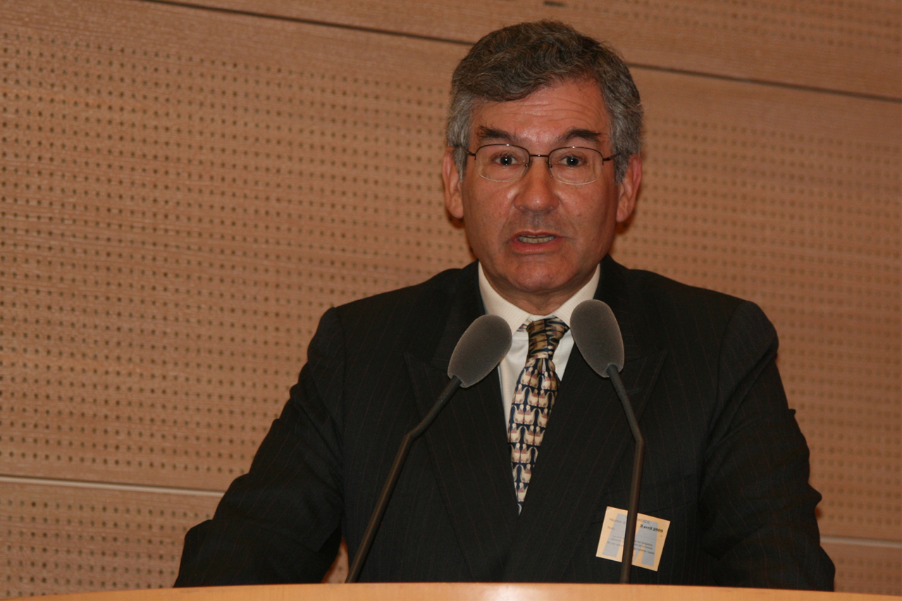 Sir Stephen Waley-Cohen lors d'une reunion de commémoration du 1er anniversaire de la mort d'André Wormser au palais du Luxembourg le 3 avril 2009.